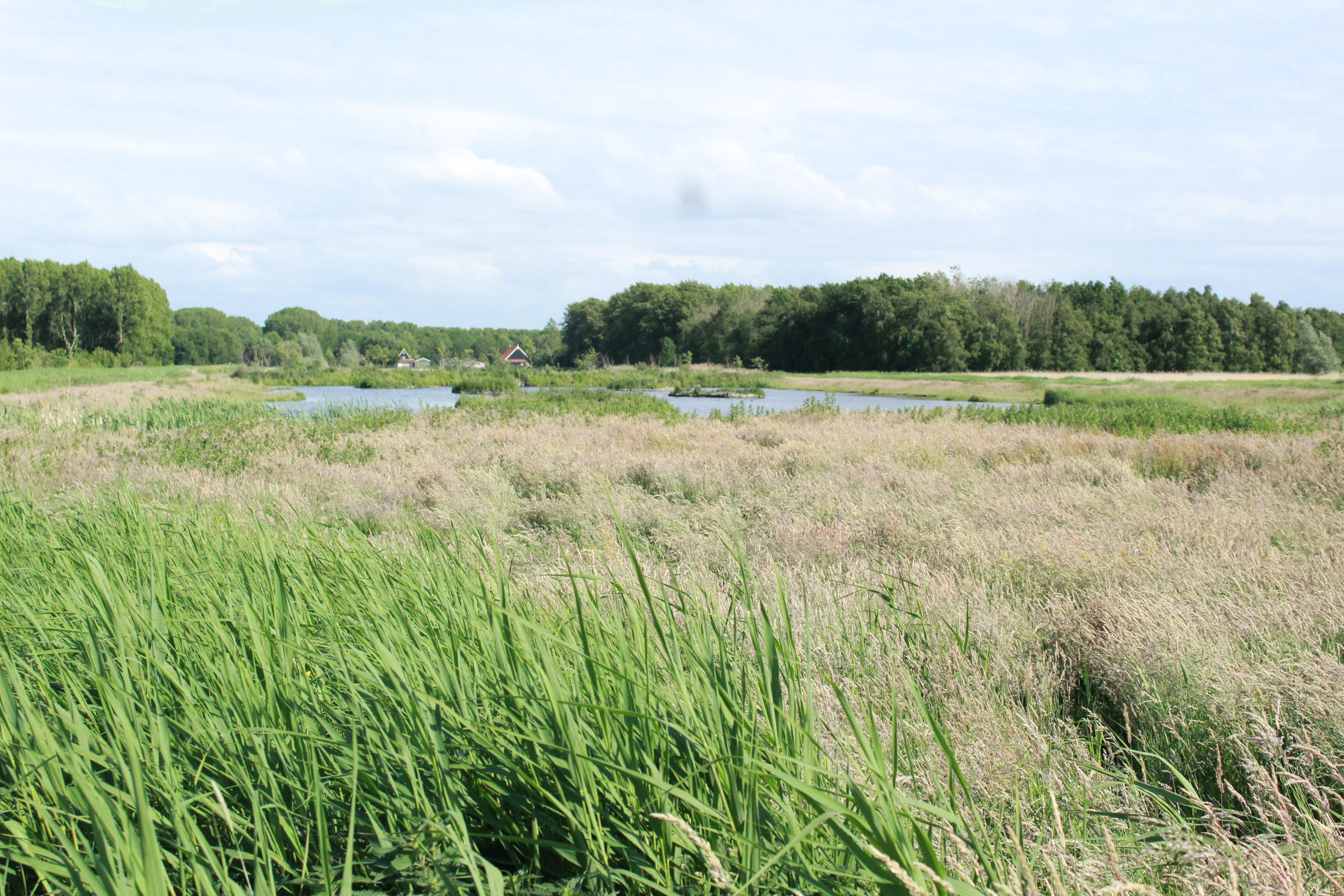 Moerasperceel met rietland in het zuidelijk deel van het Purmerbos, waar vele (riet)vogels zich vestigen. Hier zit onder andere ook de bruine kiekedief soms